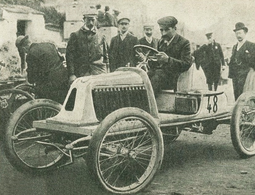 Jean-Marie Corre en 1902 au Circuit des Ardennes dans sa voiturette (27e) - La Vie au Grand Air du 7 janvier 1904, p.12